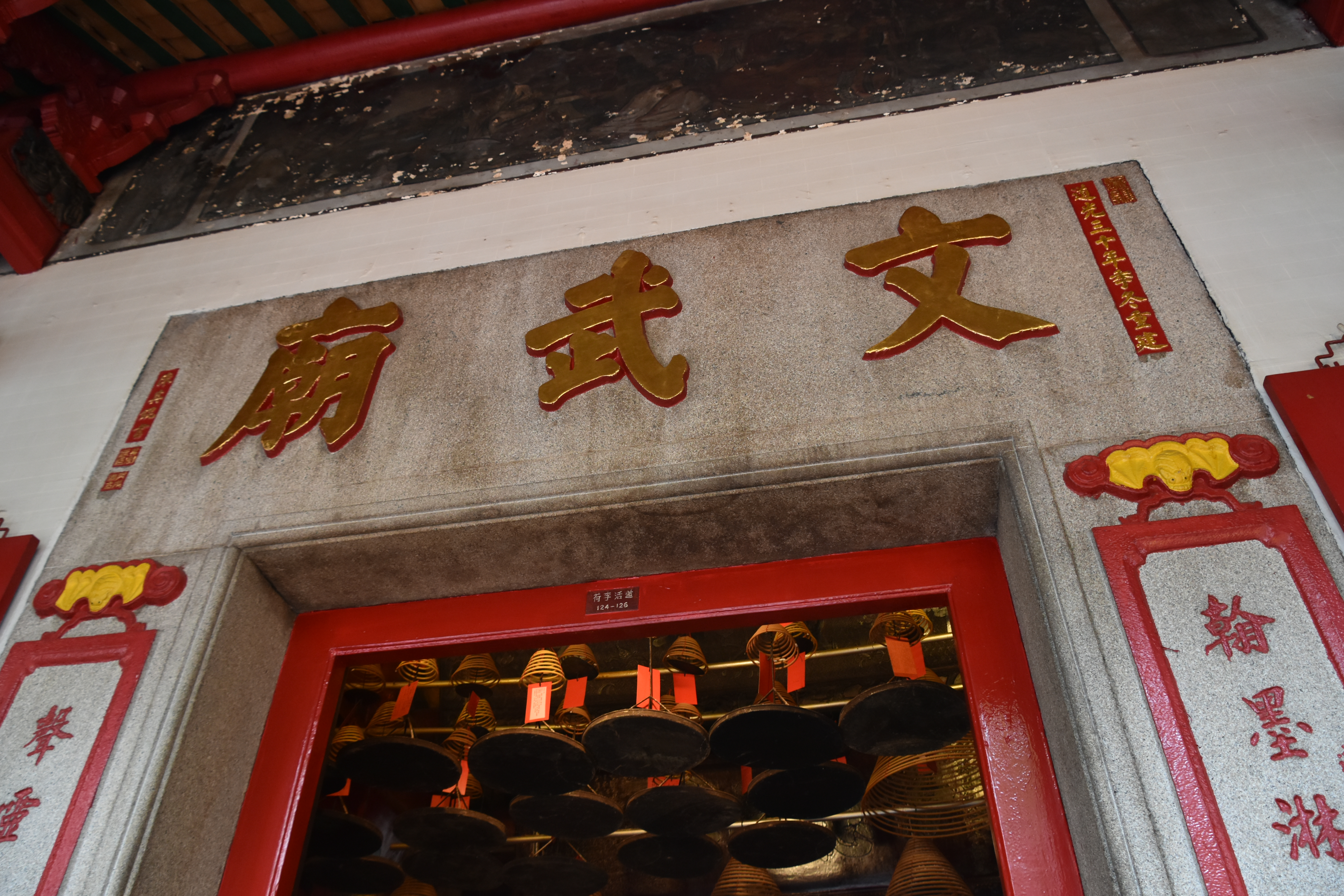 Man Mo Temple, 1847-62, Sheung Wan, Hong Kong (17)